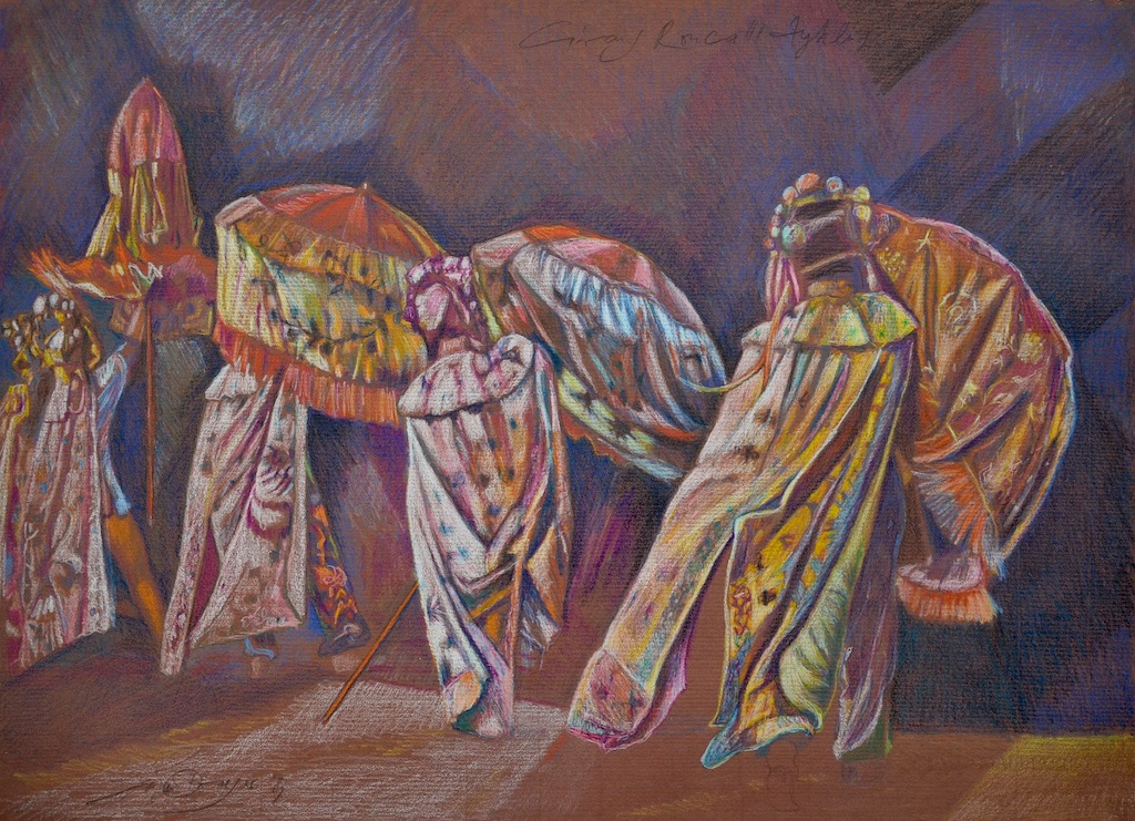 Pastell auf Roma Büttenpapier 67 x 49 cm, 1983 3 Jahre lang begleitete Draeger den poetischen Zirkus von Bernhard Paul.